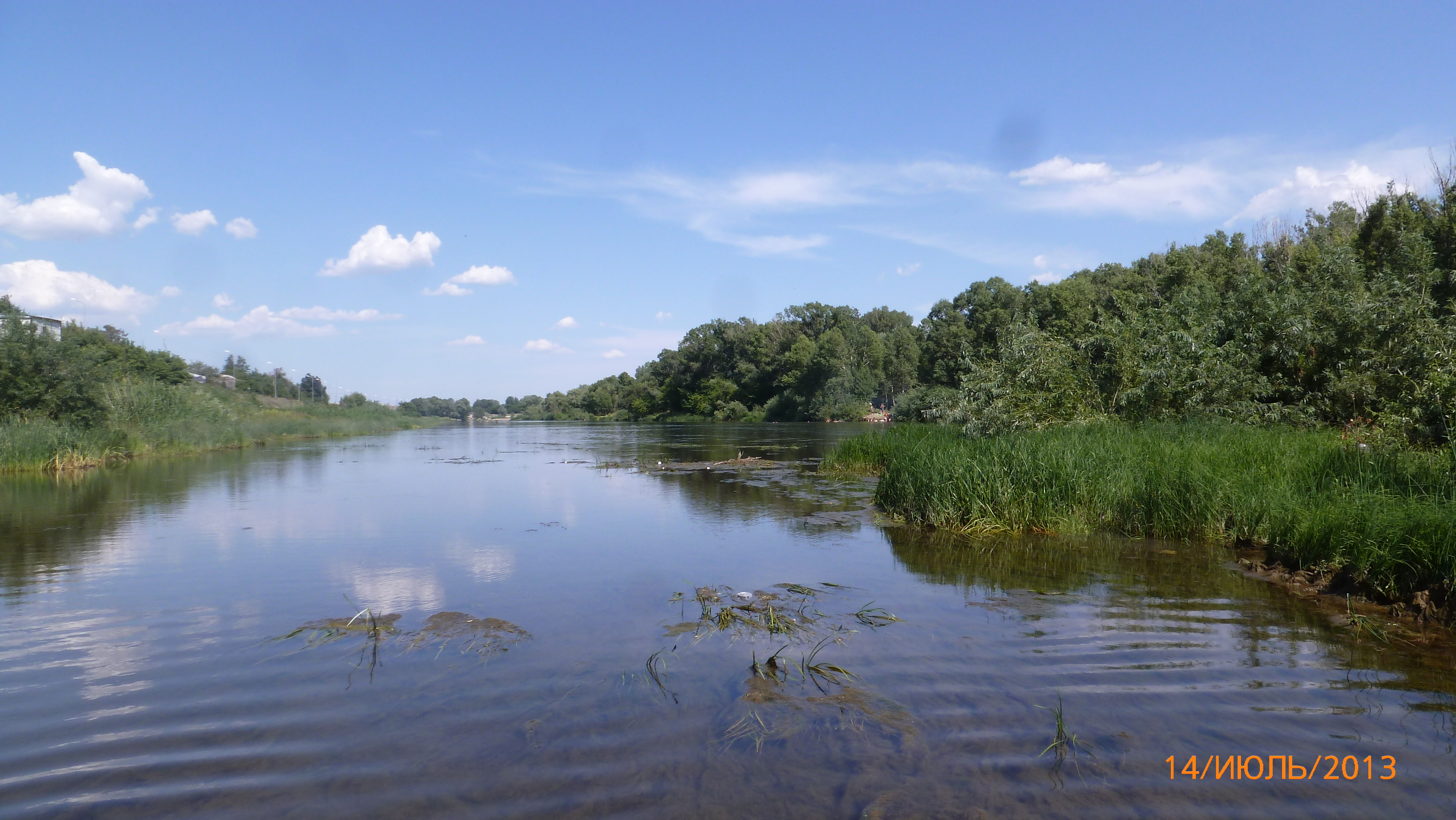 река Иртыш